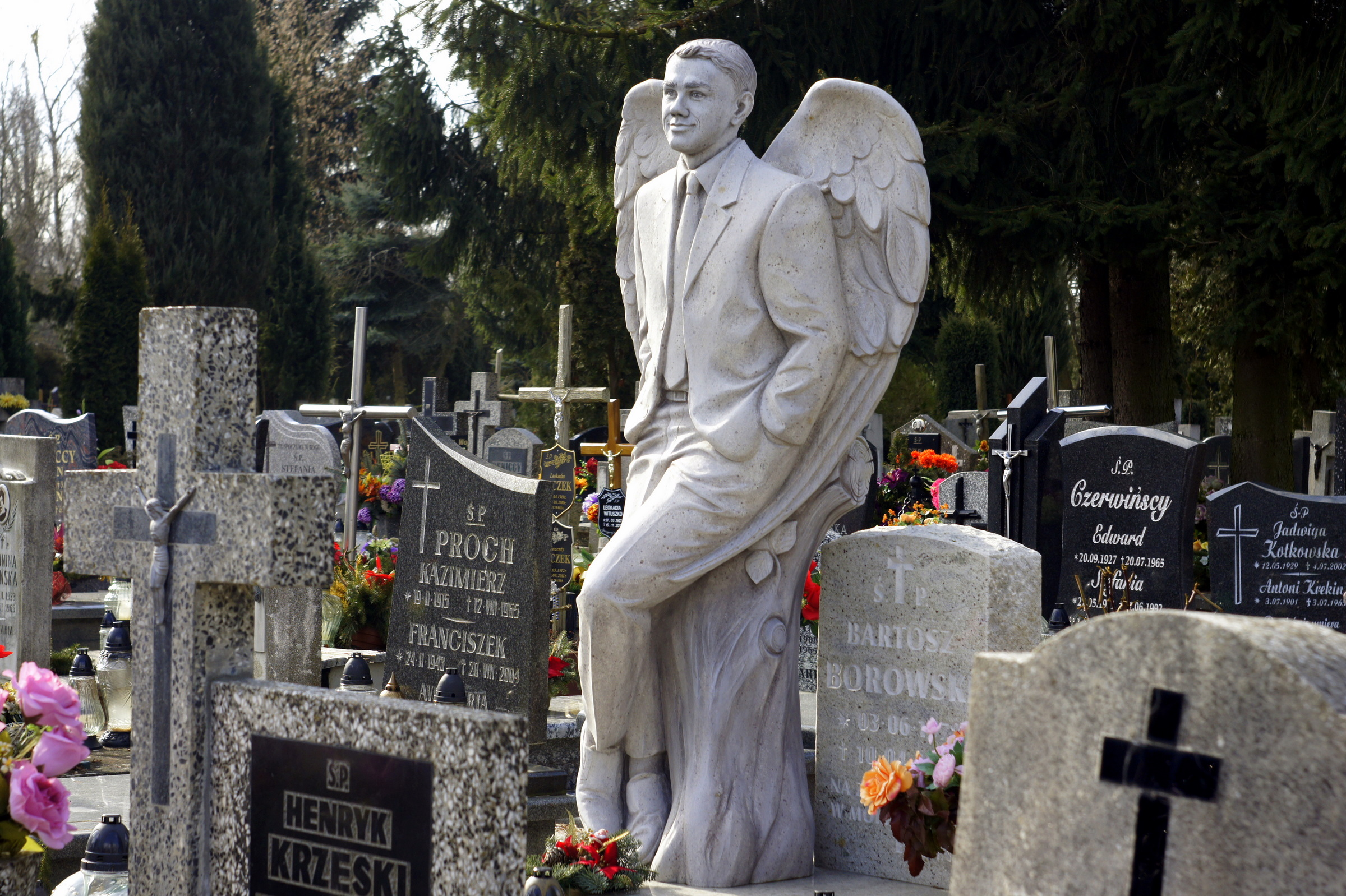 Grób Bartosza Borowskiego, ofiary katastrofy lotniczej w Smoleńsku 10. 04. 2010 r. Cmentarz komunalny w Gorzowie Wlkp.